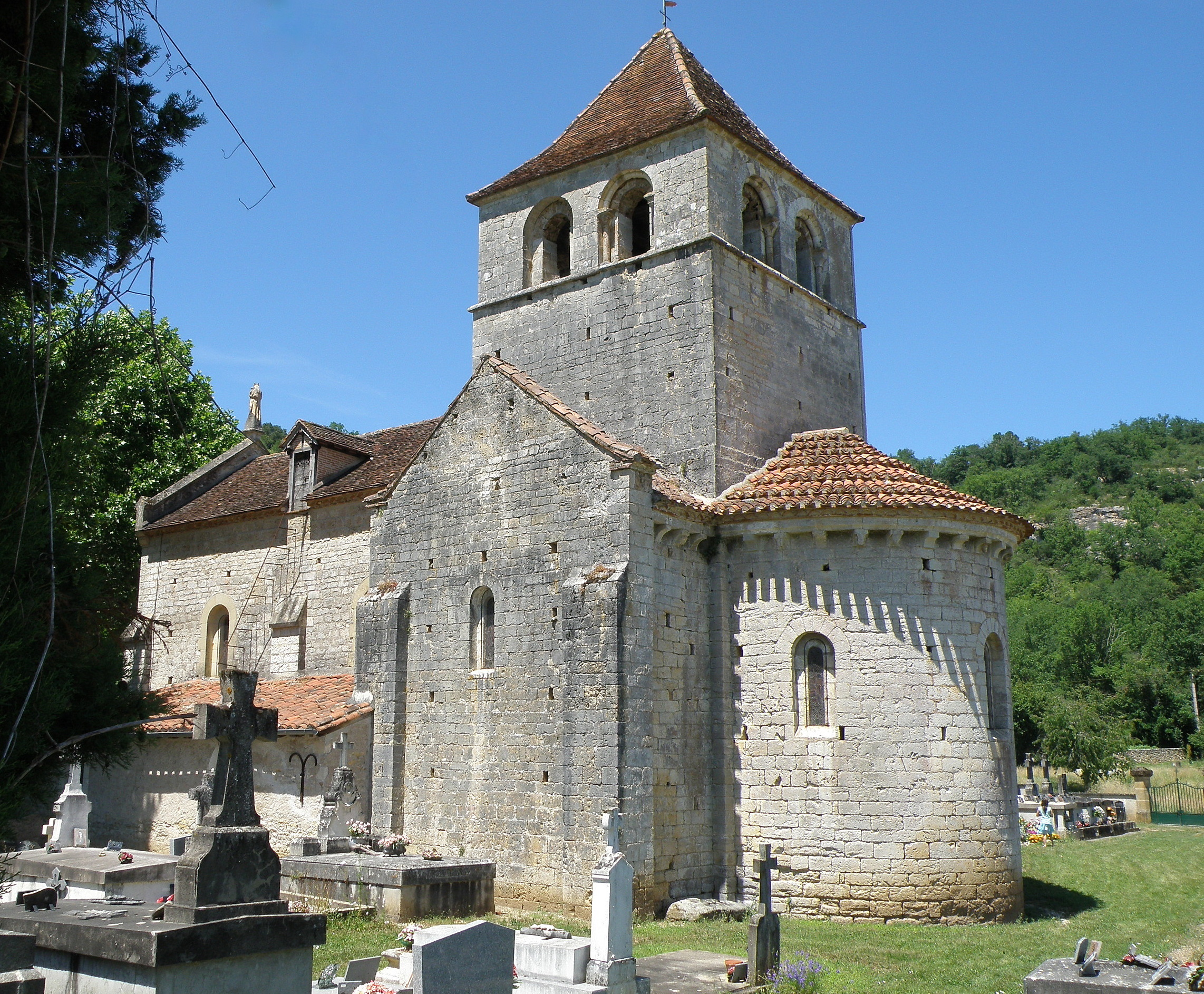 Église Notre-Dame-de-Vêles (ou Notre-Dame-de-Velles), église romane isolée (XIIIe siècle), sise en bordure du Lot, dans la commune de Vers, à un km environ au sud-sud-ouest de cette localité. Flanc sud avec nef (à gauche), transept, tour de croisée et abside semi-circulaire (à droite).